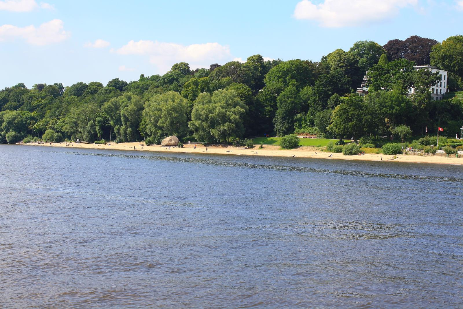 Hamburg 2009 (Othmarschen, Schröders Elbpark)